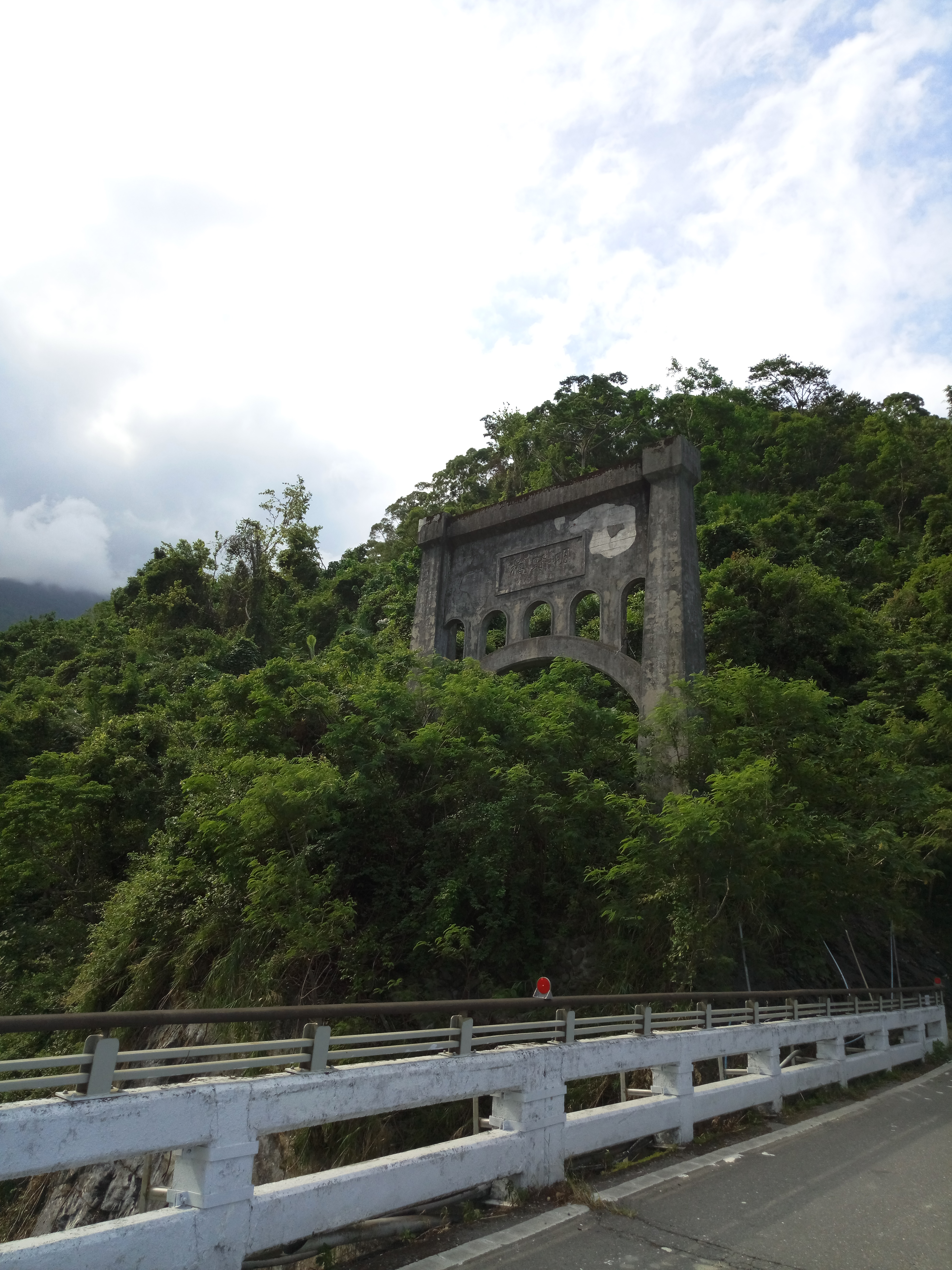 中文（台灣）: 明野橋北岸墩座